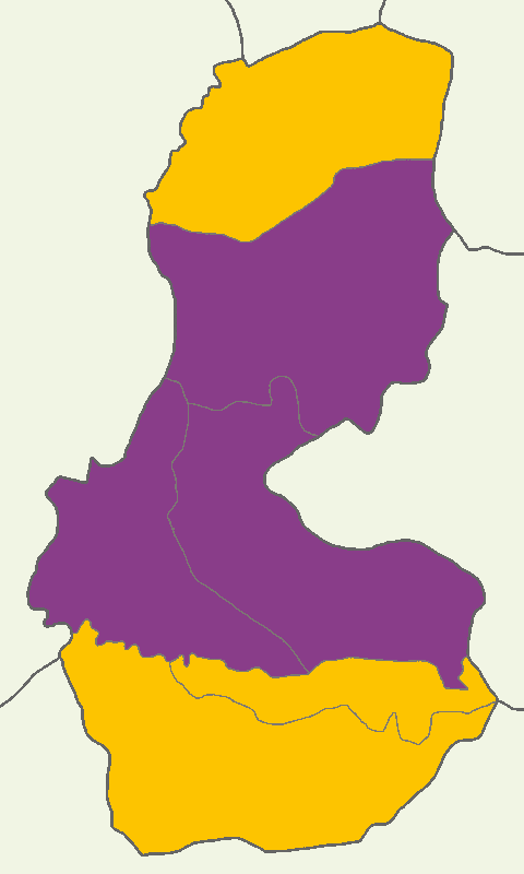 Batman'da 2014 Türkiye cumhurbaşkanlığı seçimi sonuçları